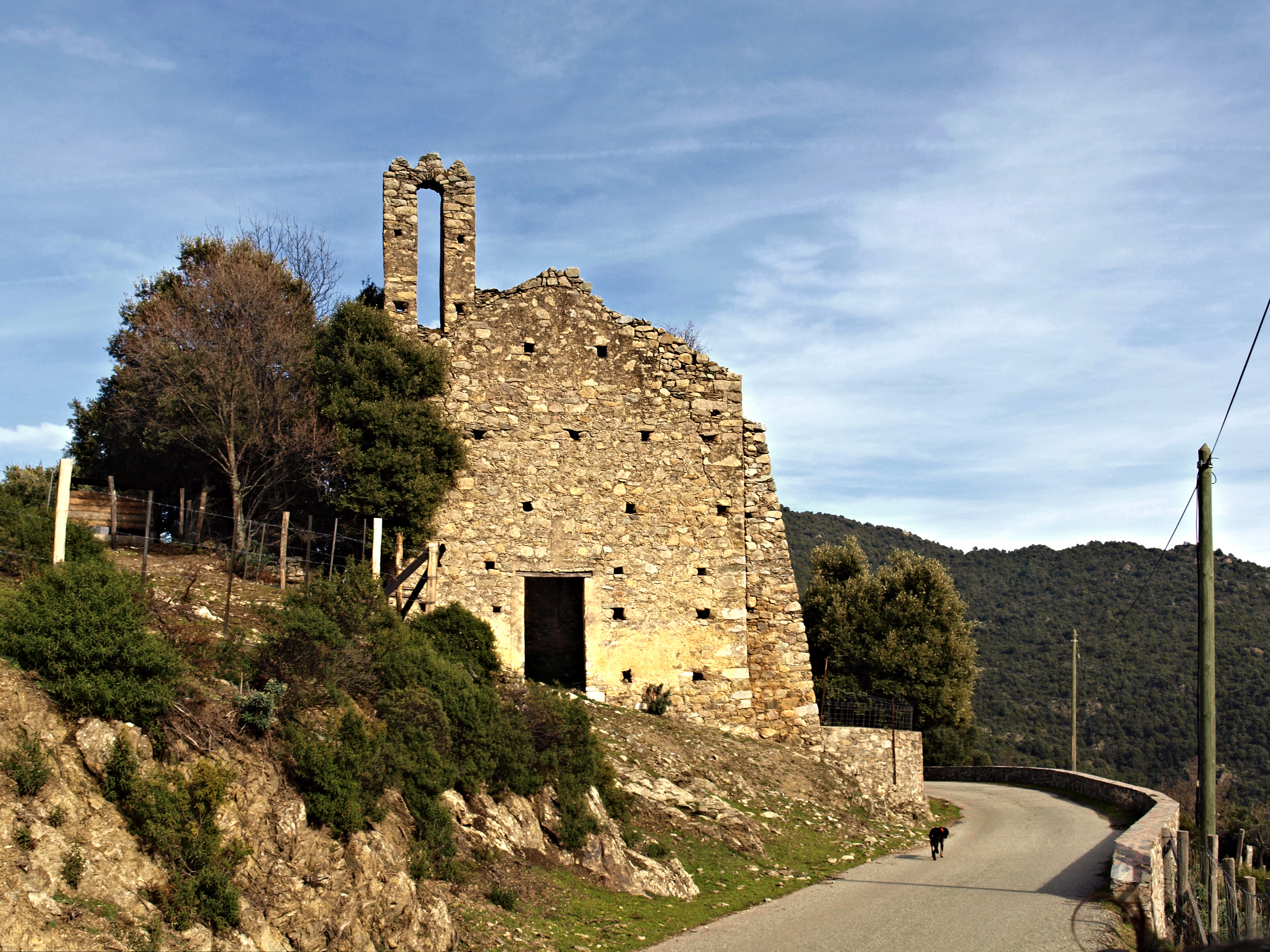 Popolasca, Giovellina (Haute-Corse) - Ruines de l'église St-Jean au cimetière communal